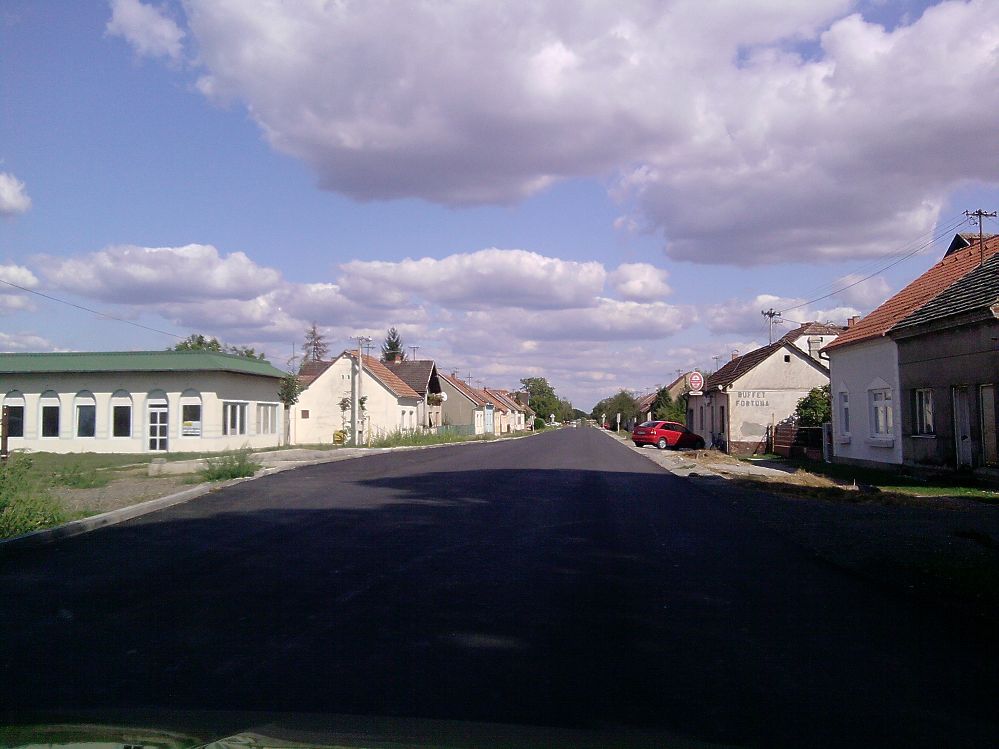 Markovac Našički